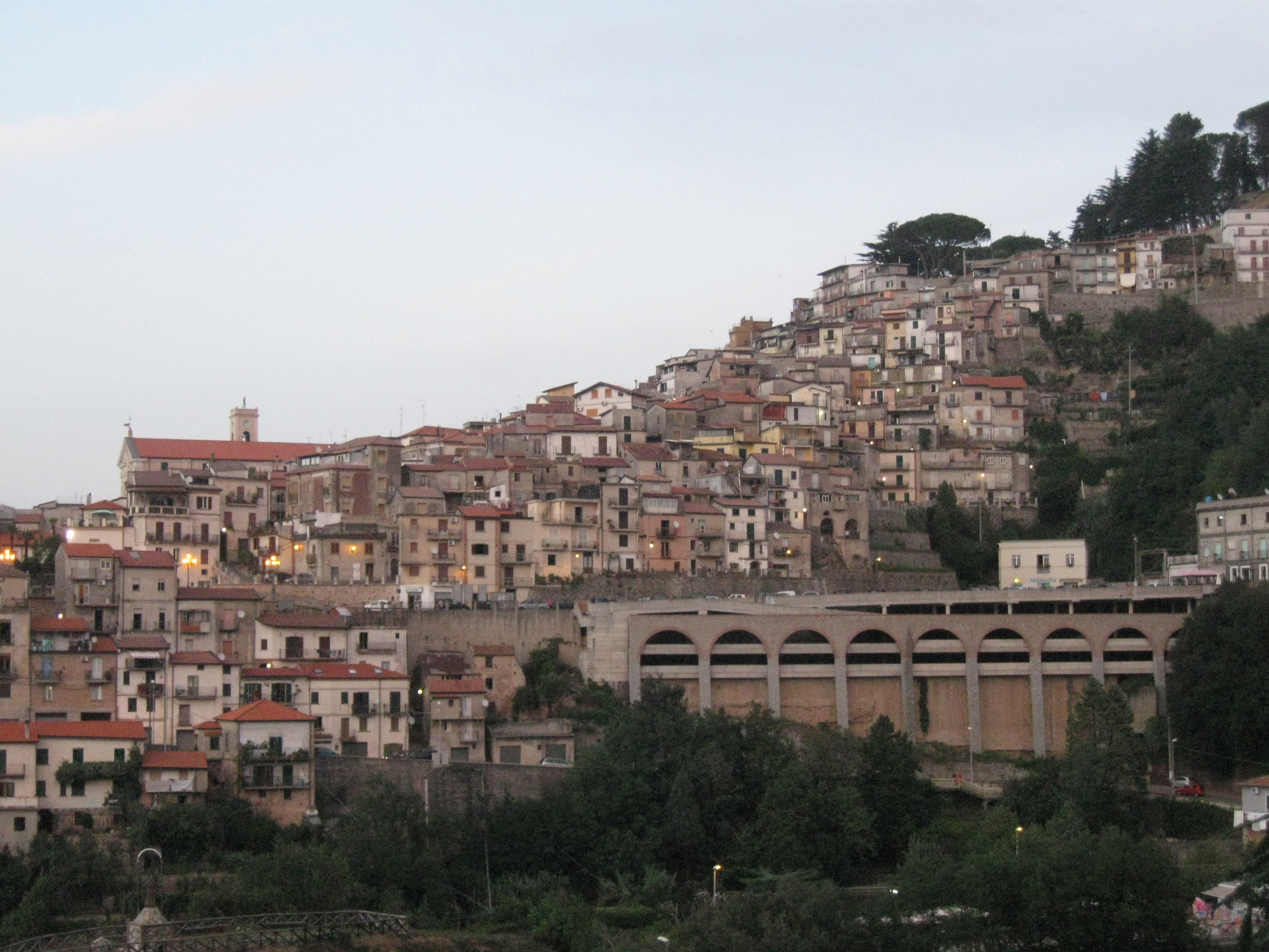 Borgo di San Giorgio Morgeto